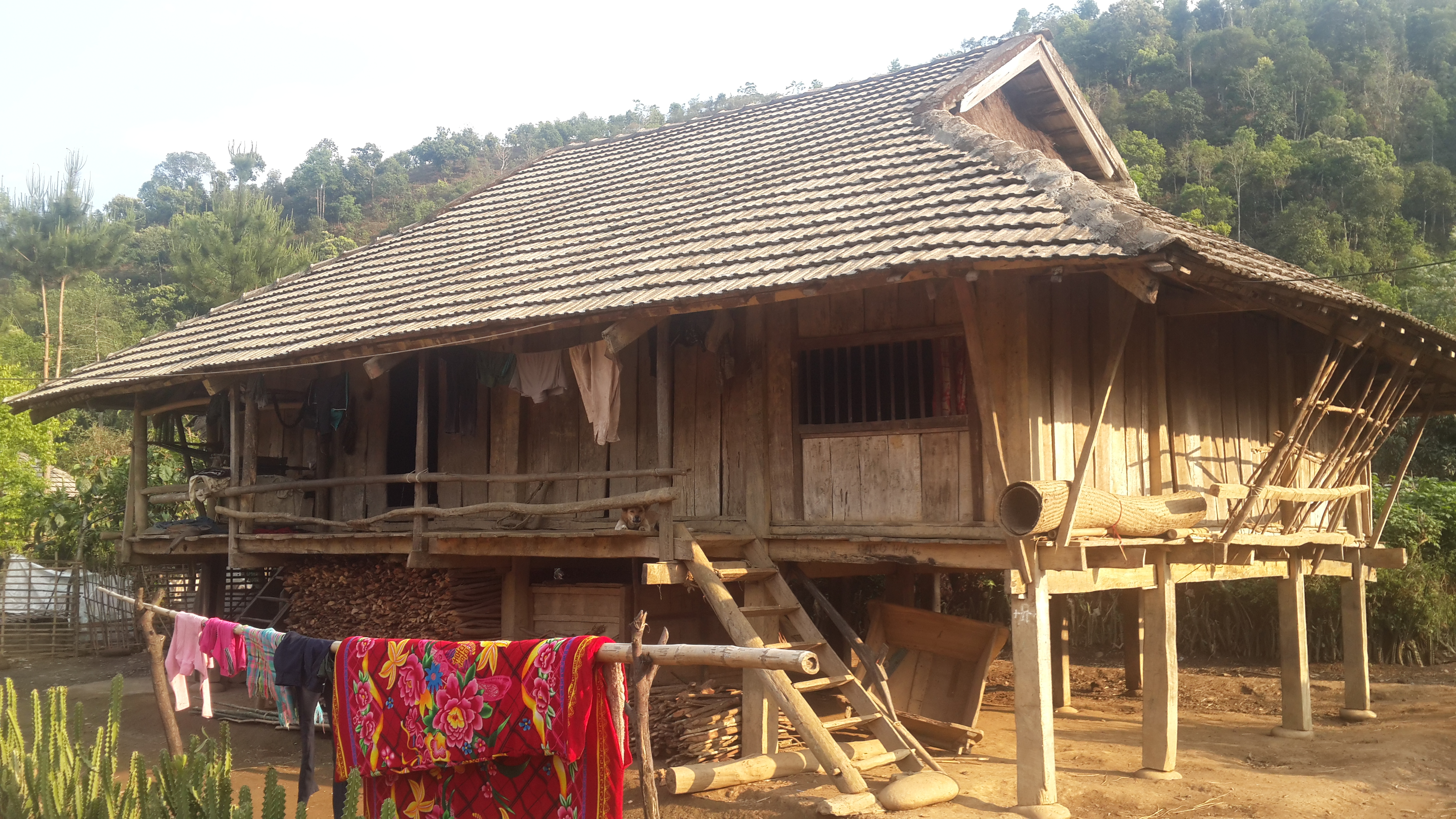 Nhà sàn tiêu biểu của người Lào ở Tam Đường, Lai Châu